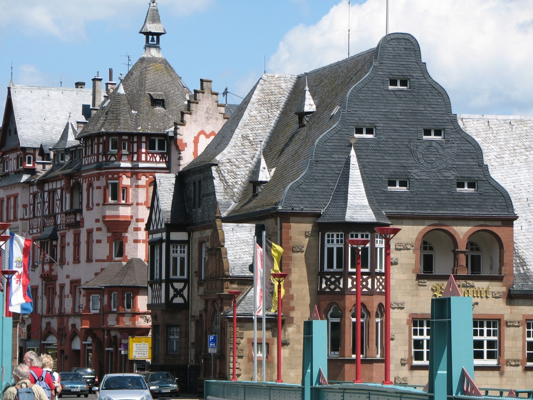 Bildet er tatt fra brua mot Traben.